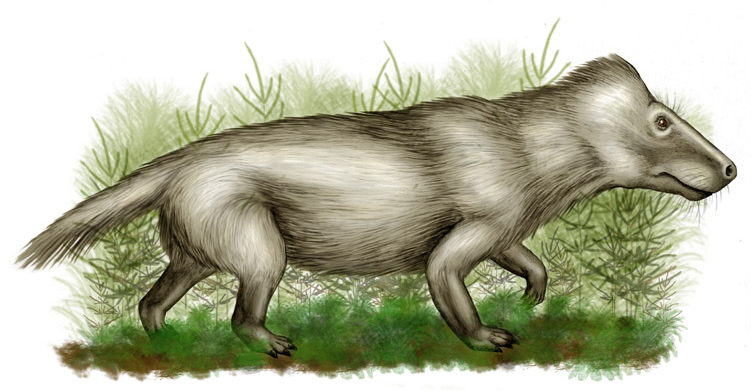 A Middle Triassic cynodont Diademodon